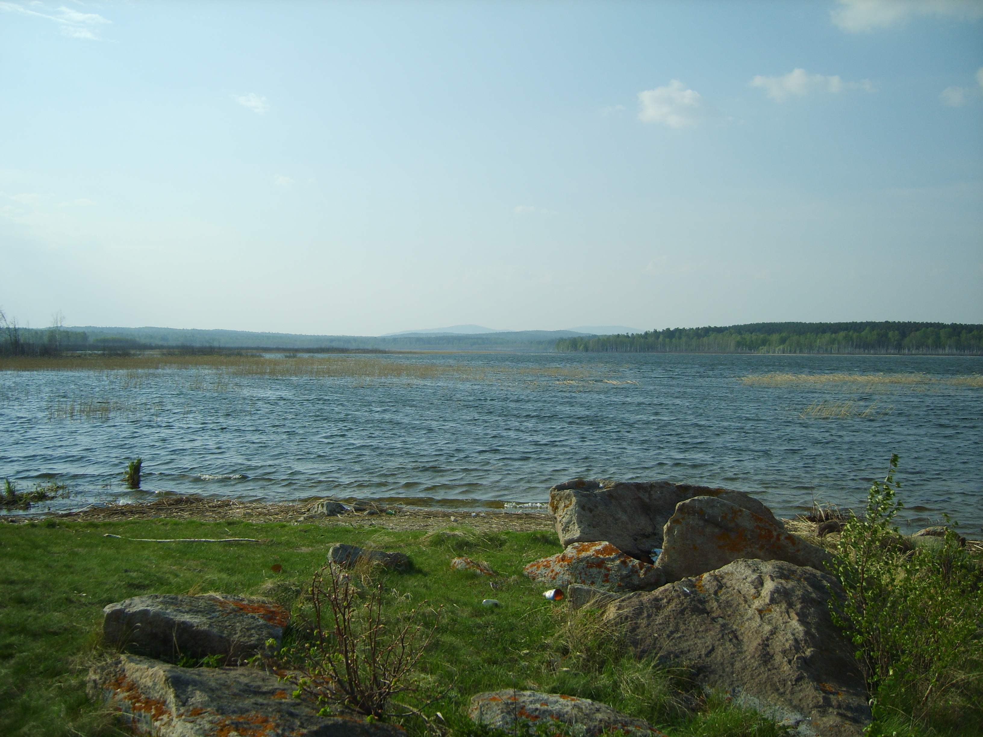 Челябинская область